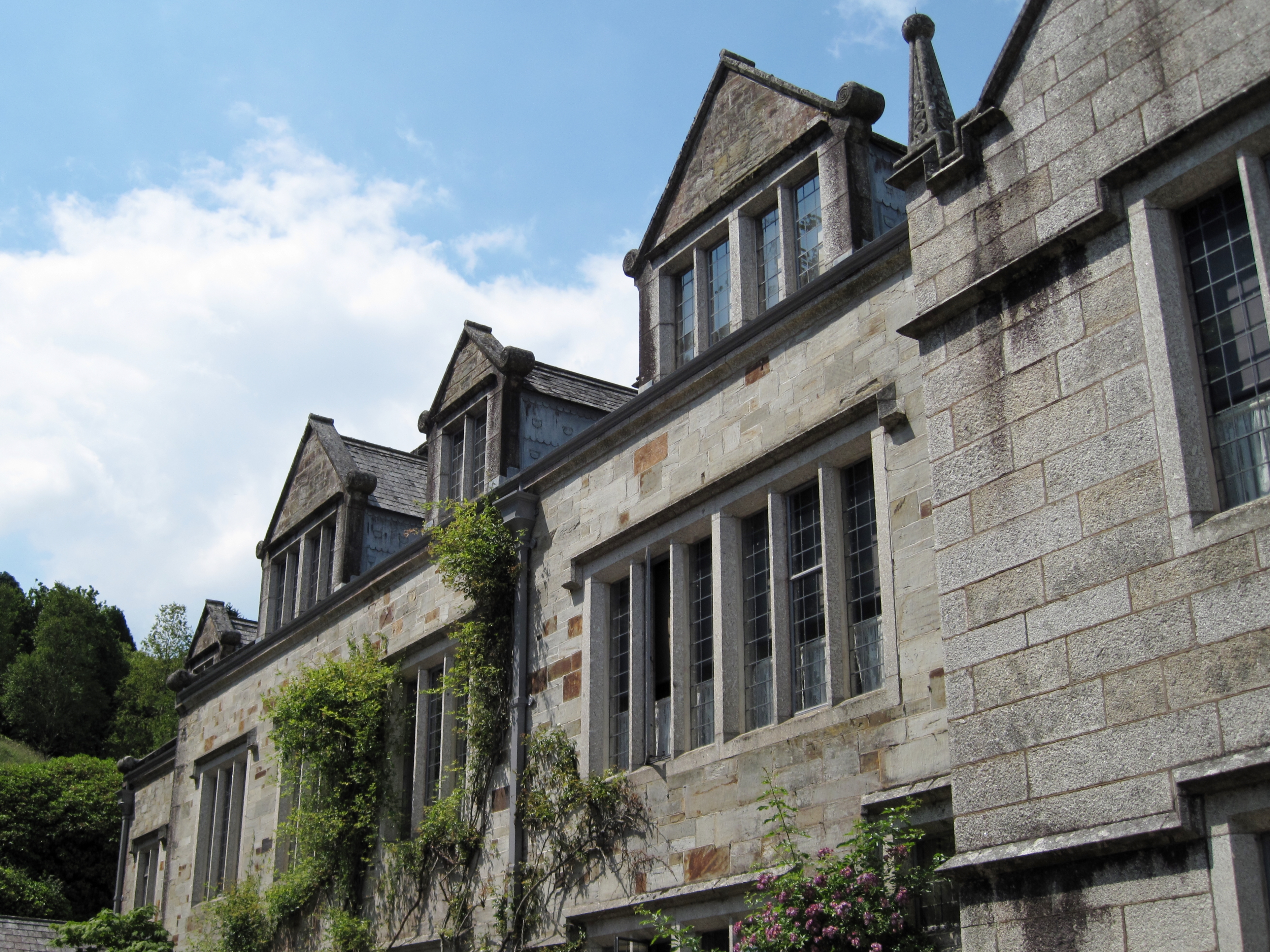 Südfassade von Lanhydrock, einem Herrenhaus nahe Bodmin in Cornwall, England